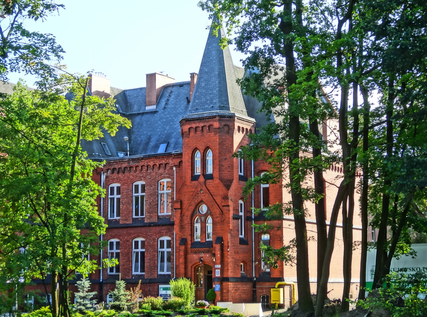 Kujawsko - Pomorskie Centrum Pulmonologii w Bydgoszczy, ul. Seminaryjna 1